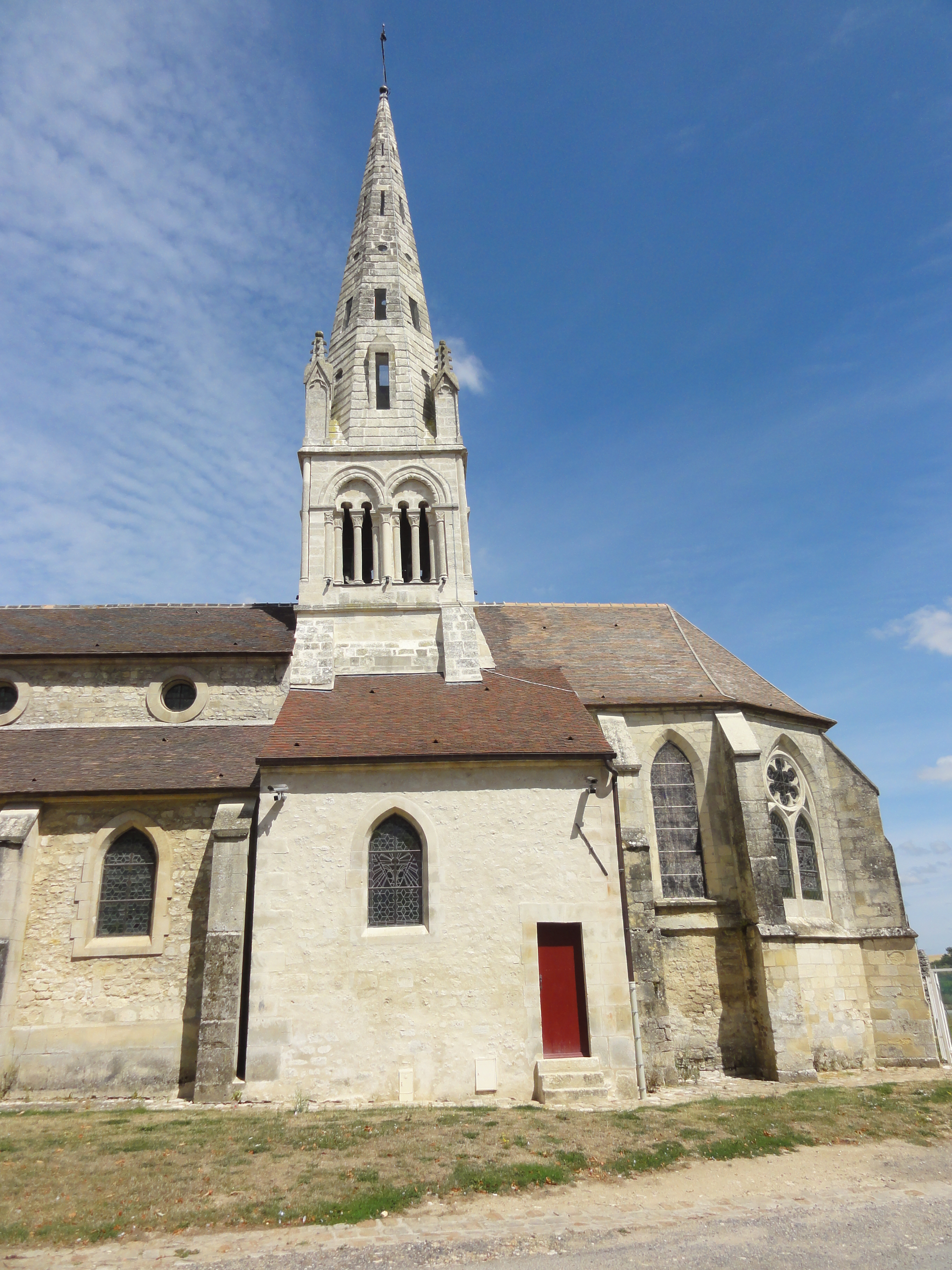 Église Saint-Martin de Néry (voir titre).